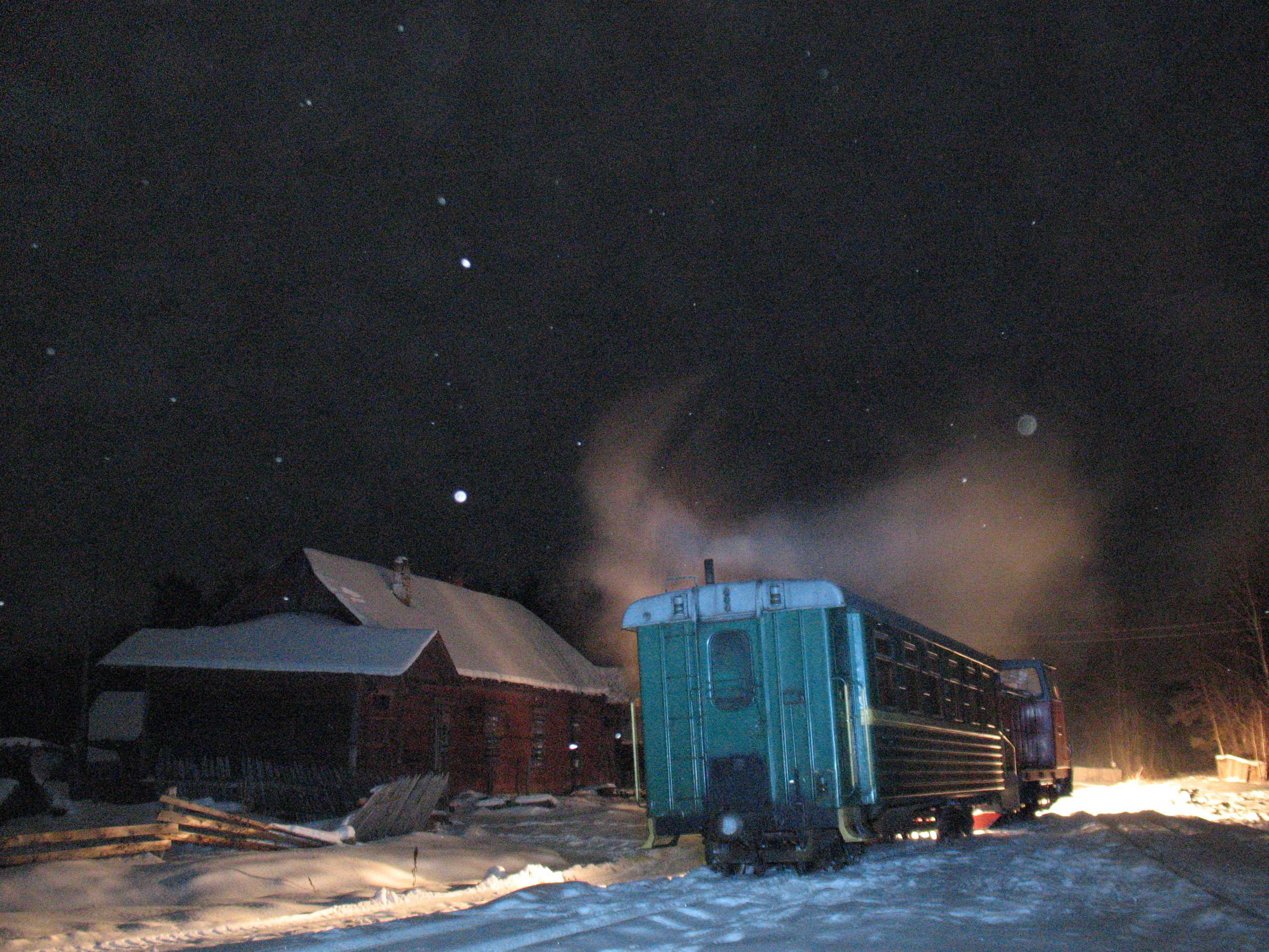 Ride on narrow gauge railway Tumskaya - Golovanova dacha at night passenger train. TU7A-2895 with one car. Line operated by RZD, and closed in april 2008. Поездка на ночном поезде по узкоколейной железной дороге Тумская - Голованова дача. Тепловоз ТУ7А-2895. Линия принадлежала РЖД, и была закрыта в апреле 2008 года.